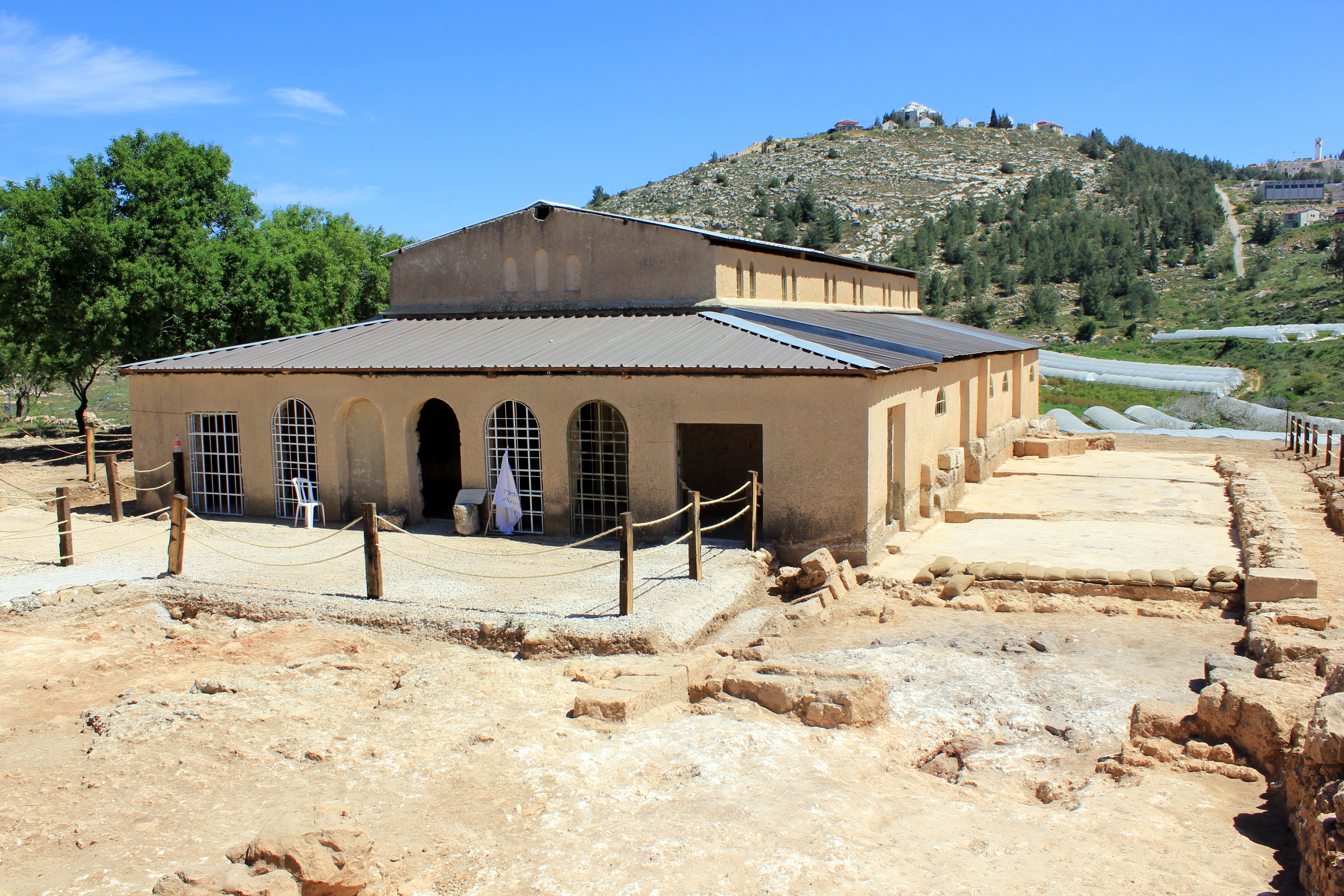 Shilo, Shiloh